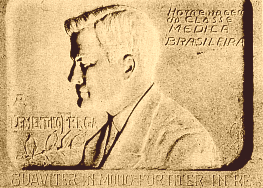 Medalha conferida em 1928 ao médico brasileiro Clementino Fraga, por seu trabalho contra a febre amarela, obra do artista Jorge Soubre.